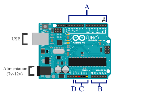 schema d'explication d'une carte arduino